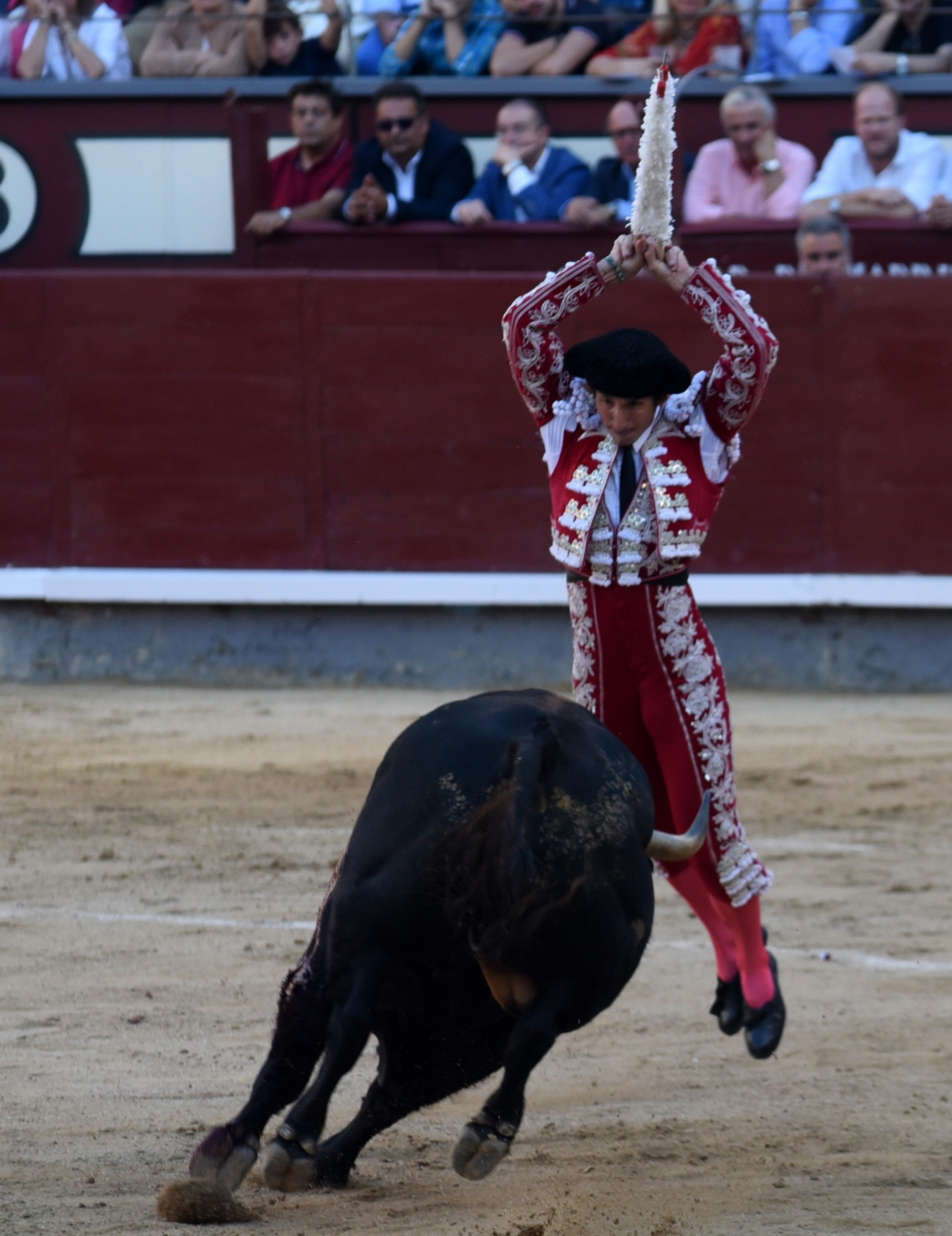 Javier Ambel exhibe la forma suprema de cargar la suerte en banderillas, recibiendo de frente con la mayor exposición.